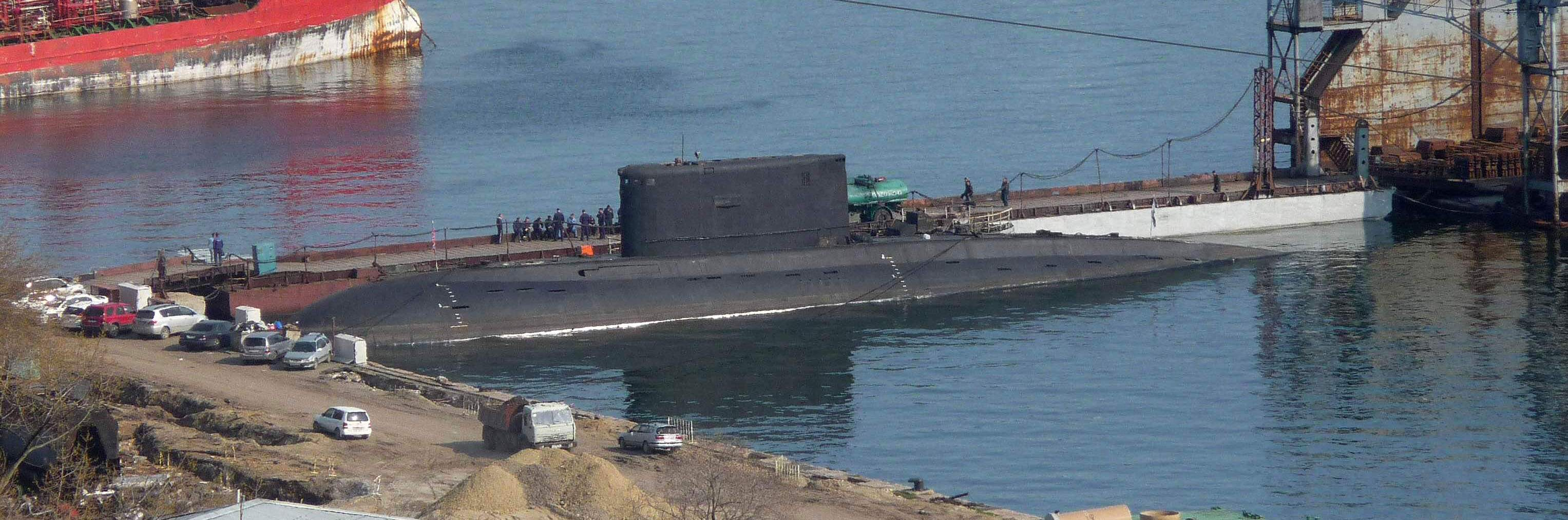 Подводная лодка Б-187 проекта 877 на территории 178-го судоремонтного завода, Владивосток